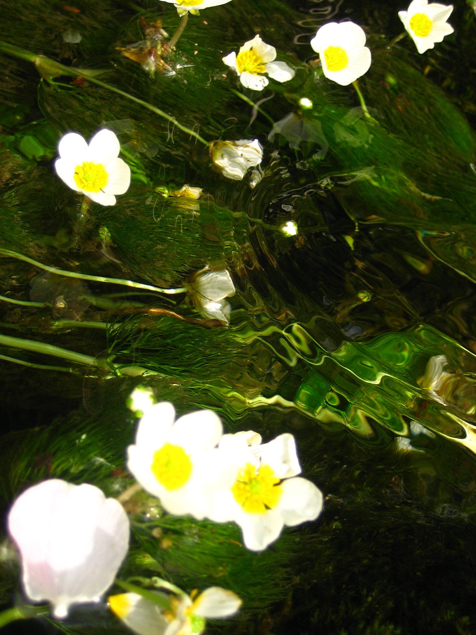 Imagen del Rio Sangusín a su paso por Fuentes de Béjar (Salamanca).